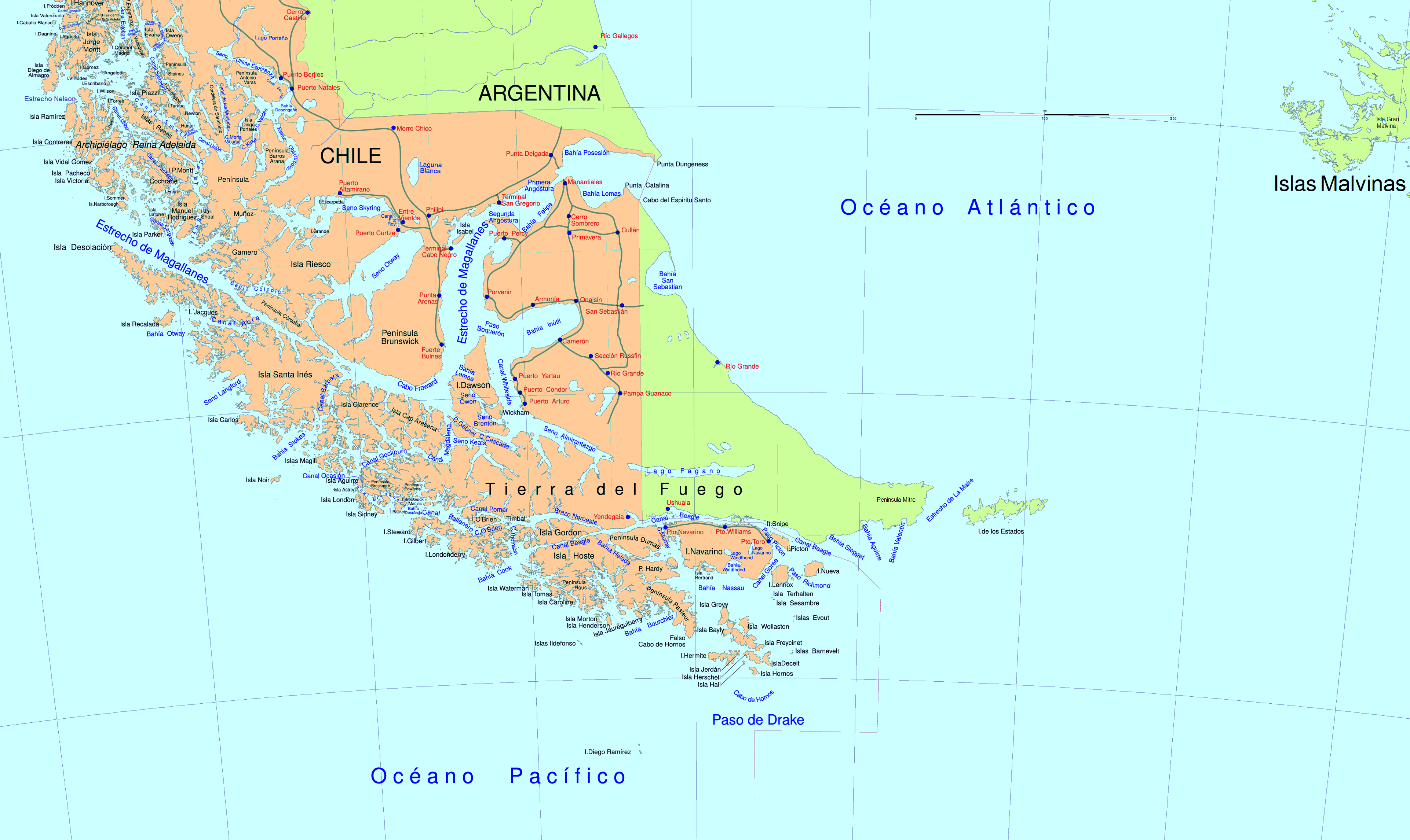 Mapa en idioma ESPAÑOL del extremo más meridional de América del Sur.